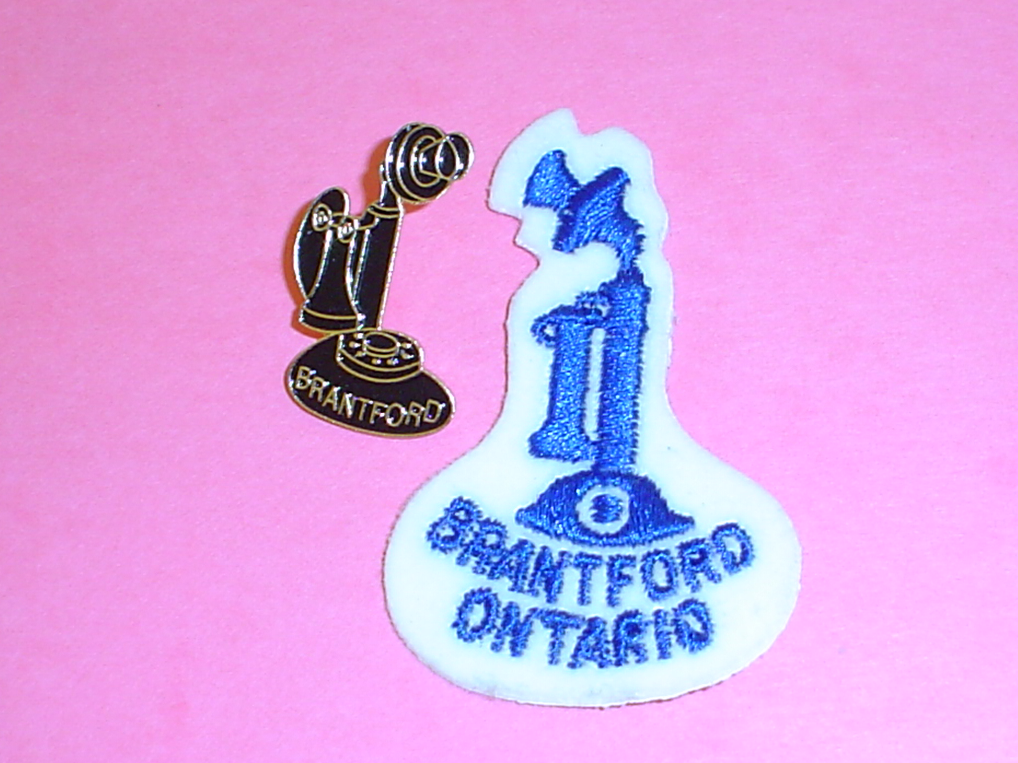 Emléktárgyak Bellről (Telefónia múzeum, Budapest)